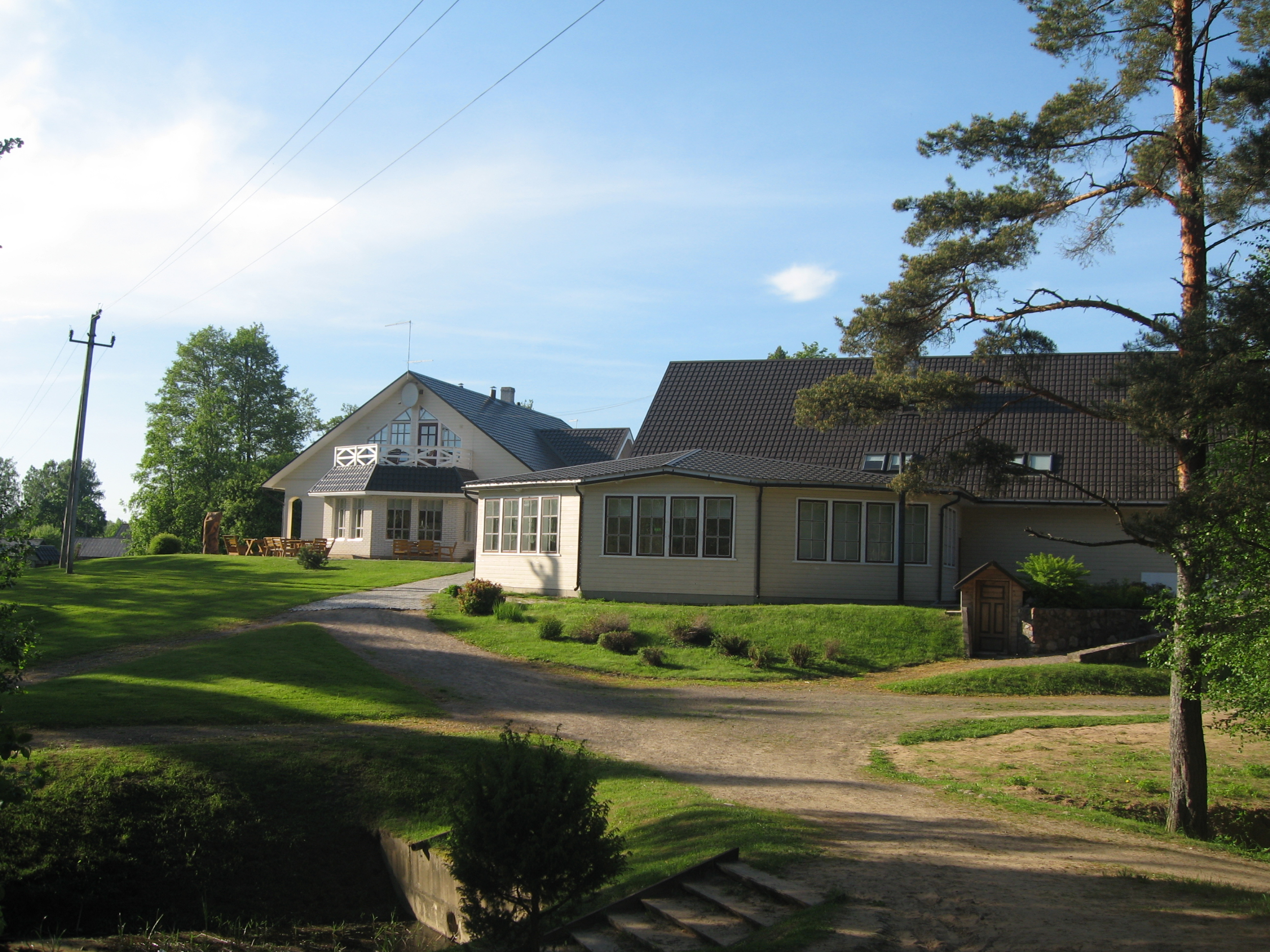 Hirvemäe Holiday Centre in Värska, Estonia.